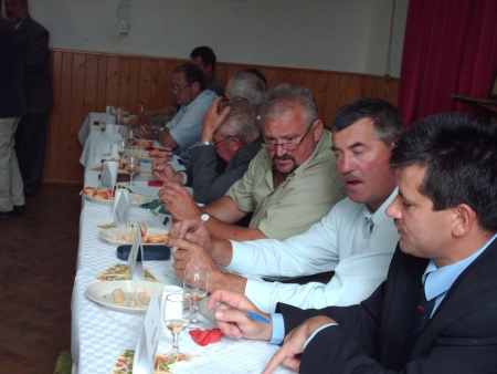 A wine jury